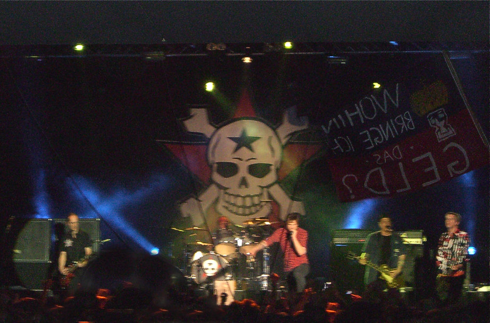 Konzert der Band Die Toten Hosen am 28. Mai 2008 in der Columbiahalle in Berlin